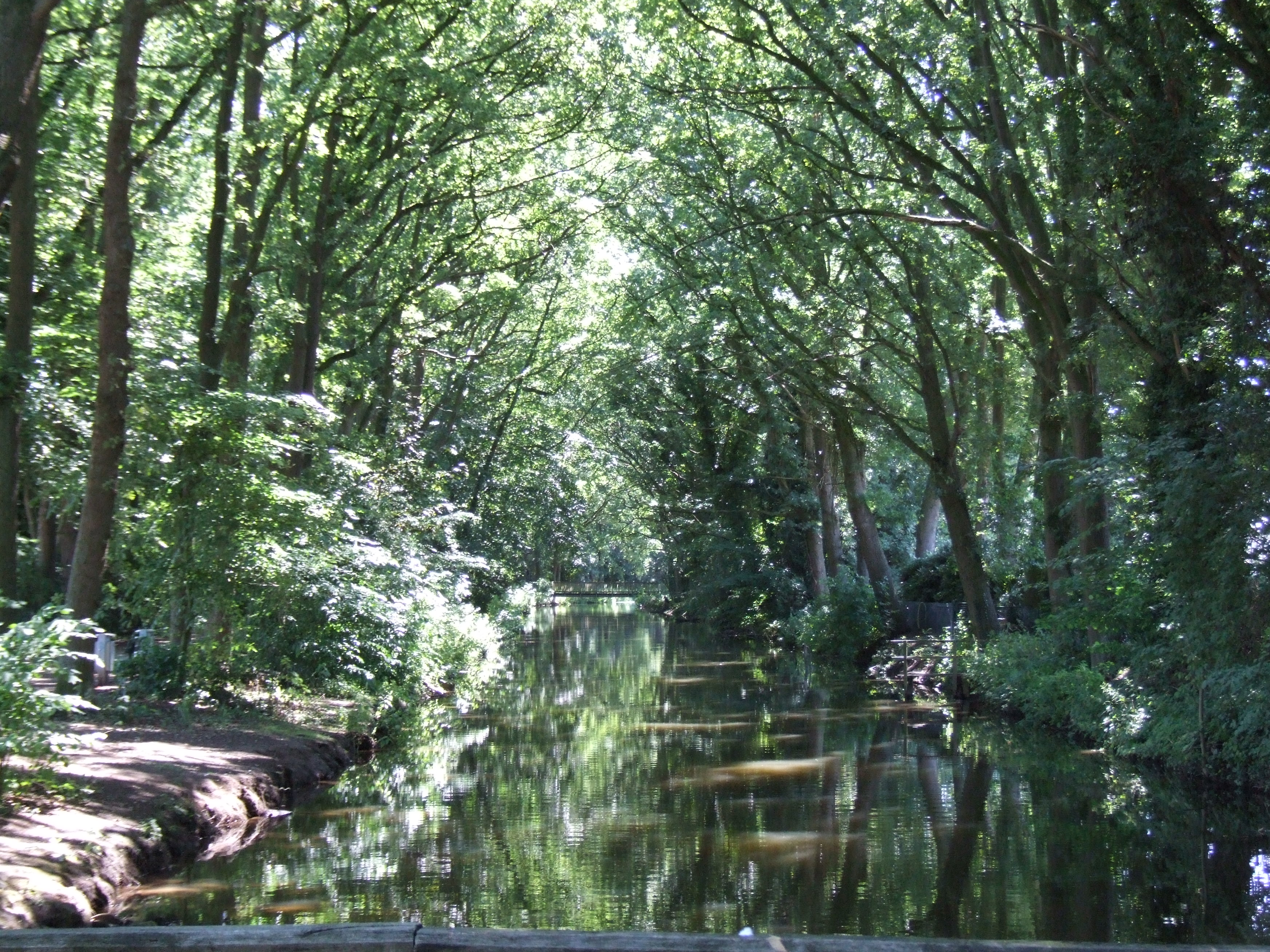 Quakenbrück, an der Hase vom Stadtpark stadtauswärts